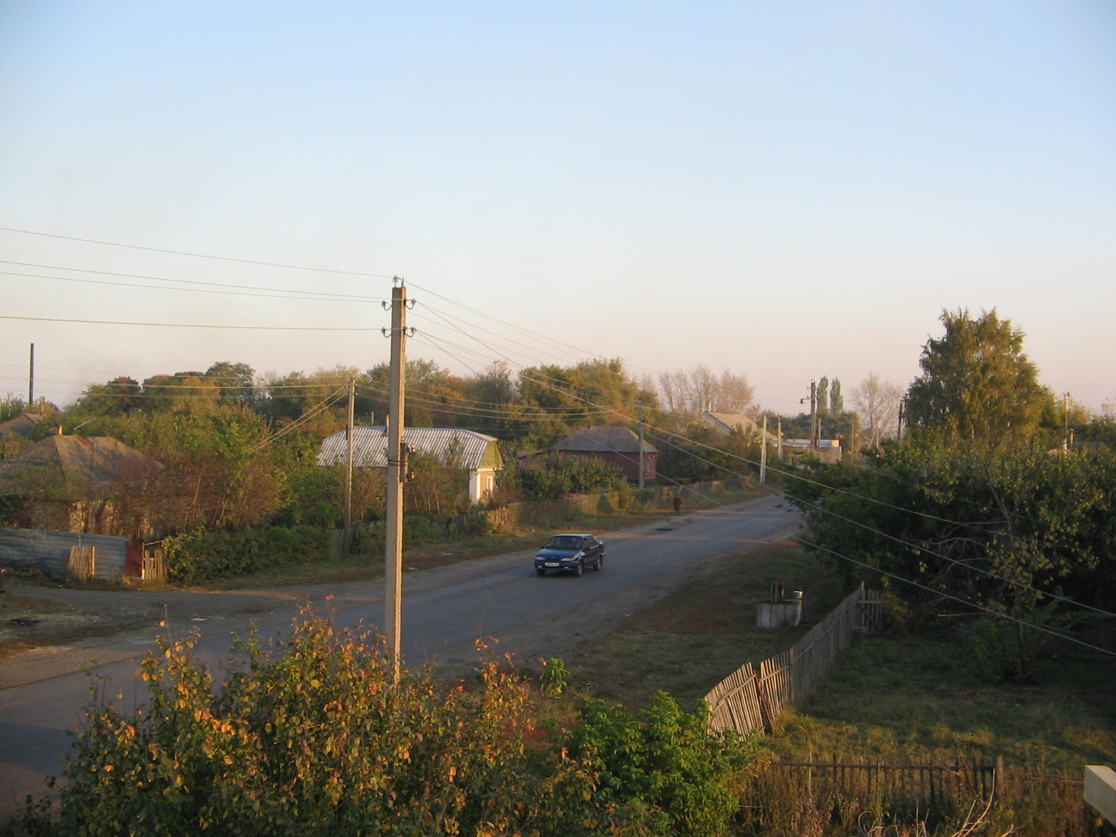 Рождественская Хава (село в Новоусманском районе Воронежской области), Въезд